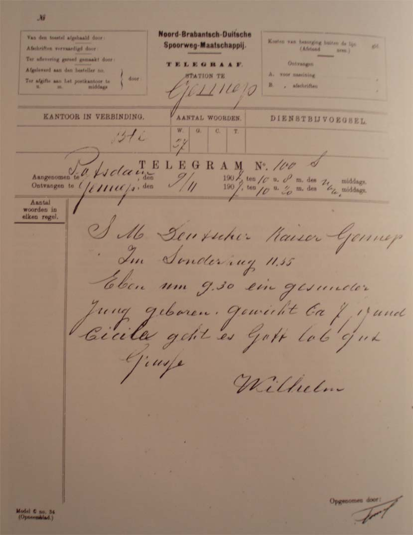 Geboorte van Louis Ferdinand wordt per telegram doorgegeven op 9 november 1907 op Station Gennep aan Keizer Wilhelm II